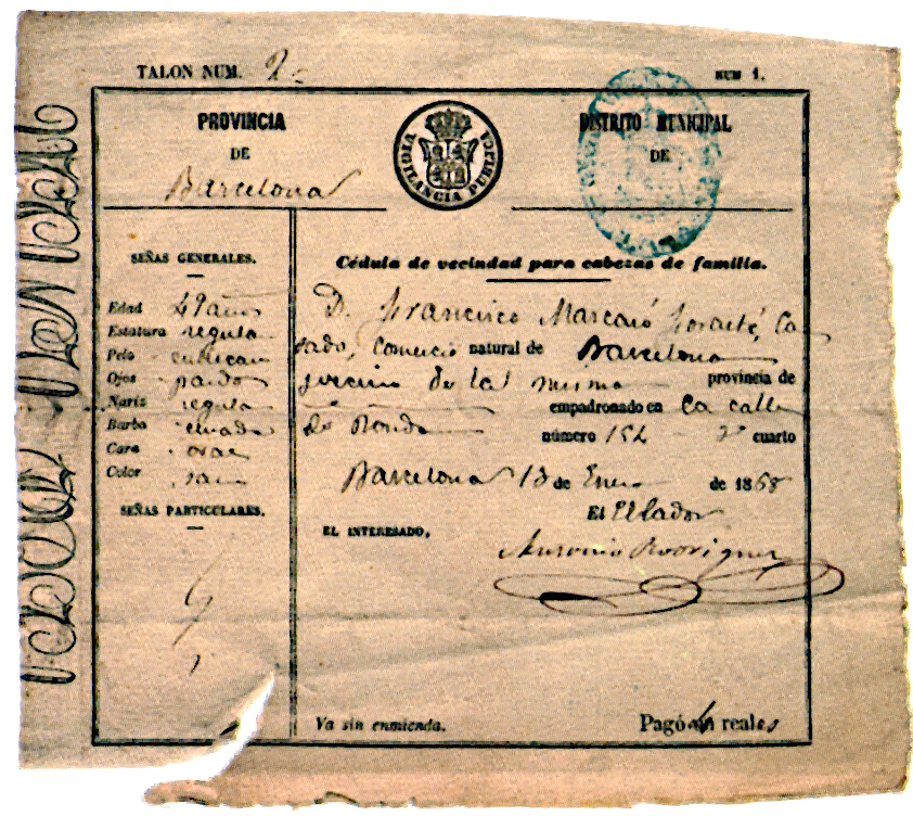 Heimatschein (cédula de vecindad) als Nachweis des Ortsbürgerrechts eines Spanier aus Barcelona, 1868.